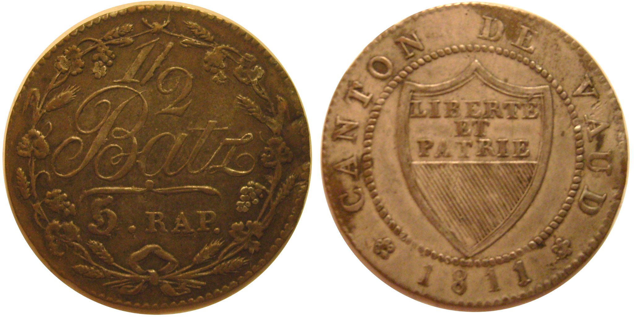 Demi-Batz, Canton de Vaud, 1811.